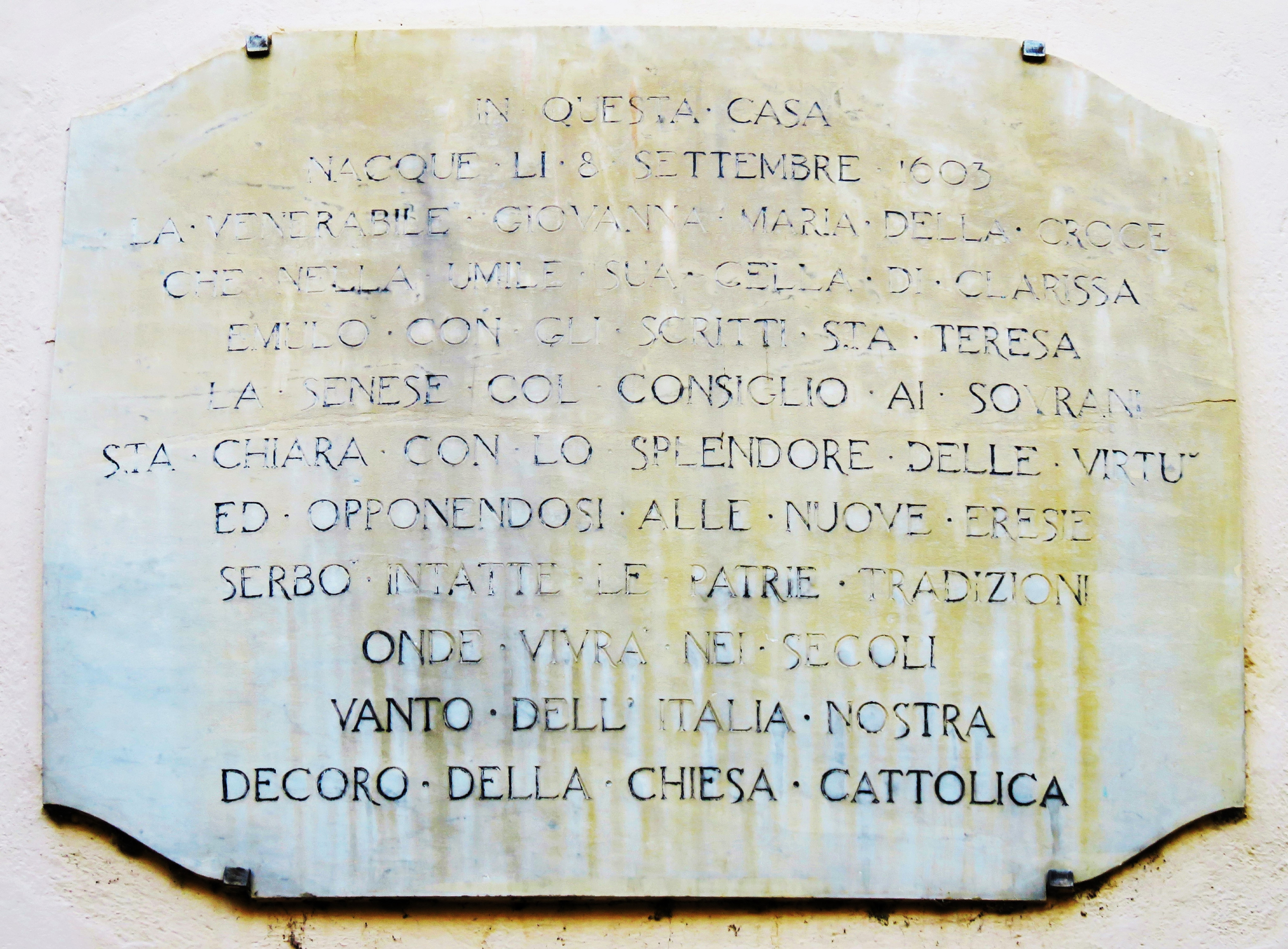 Epigrafe in piazza Loreto a Rovereto. posto sulla casa natale di Giovanna Maria della Croce (Bernardina Floriani)